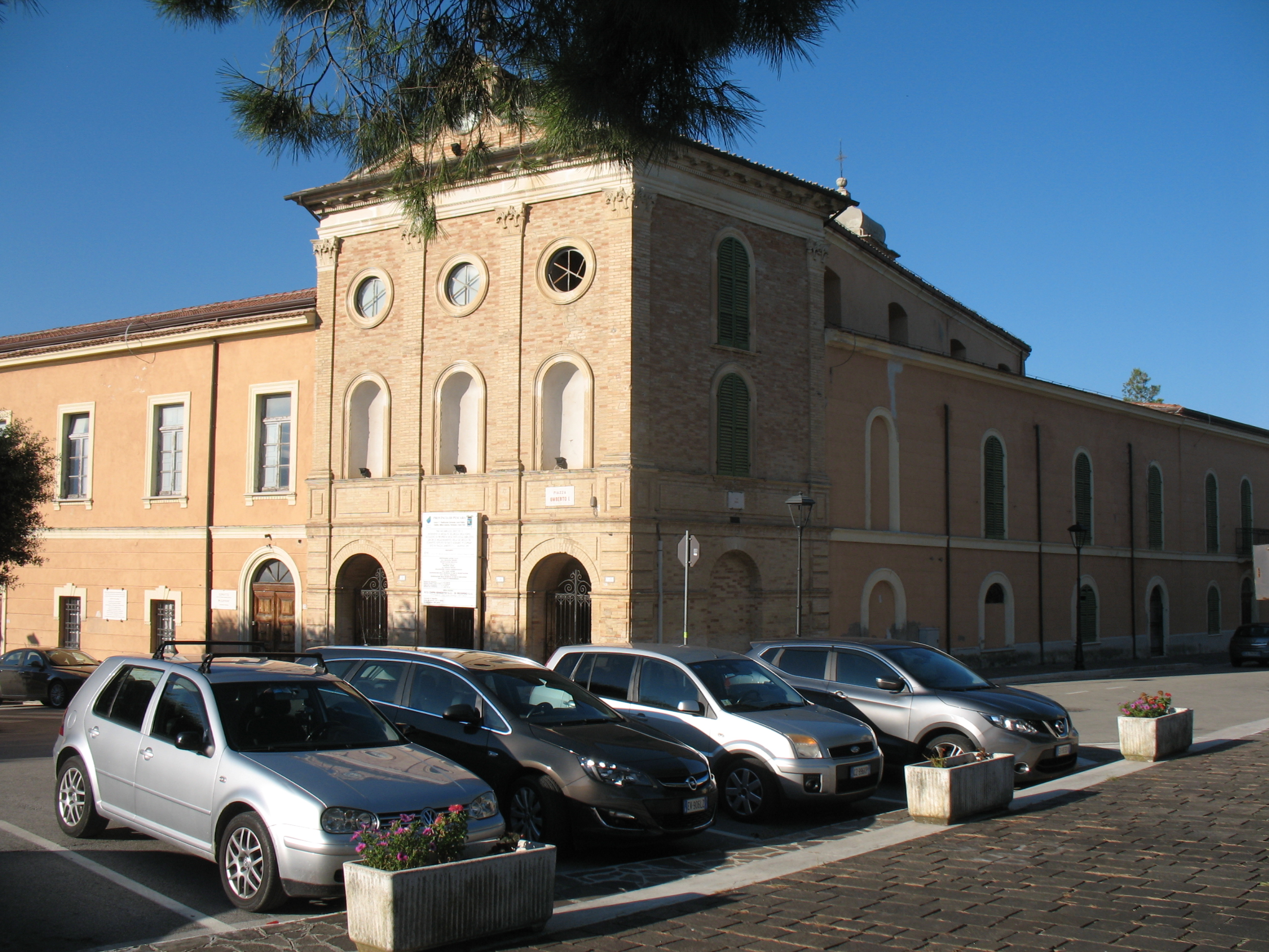 Sede attuale dell'Istituto Agrario di Alanno, ex convento francescano